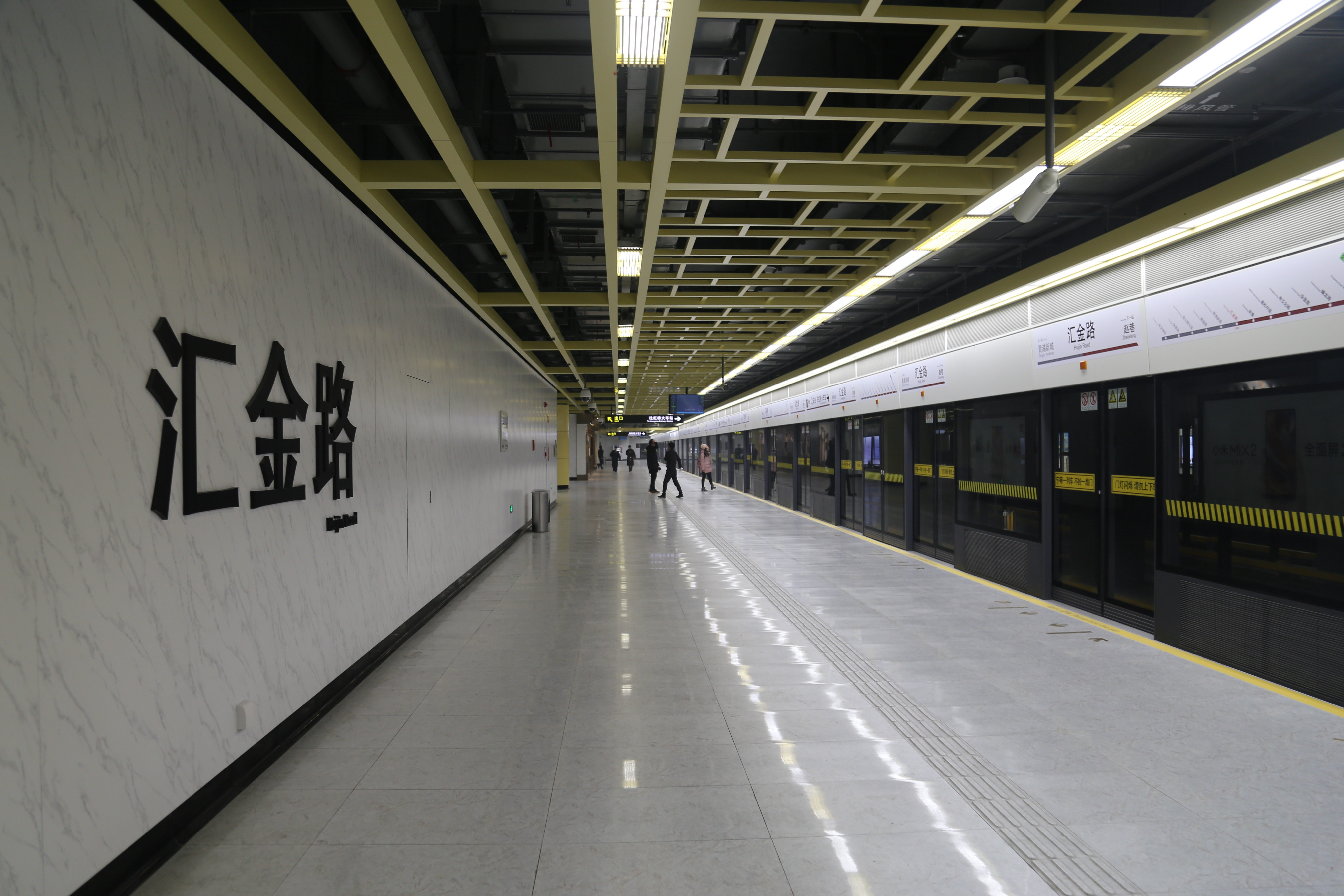 汇金路站站台与大字壁